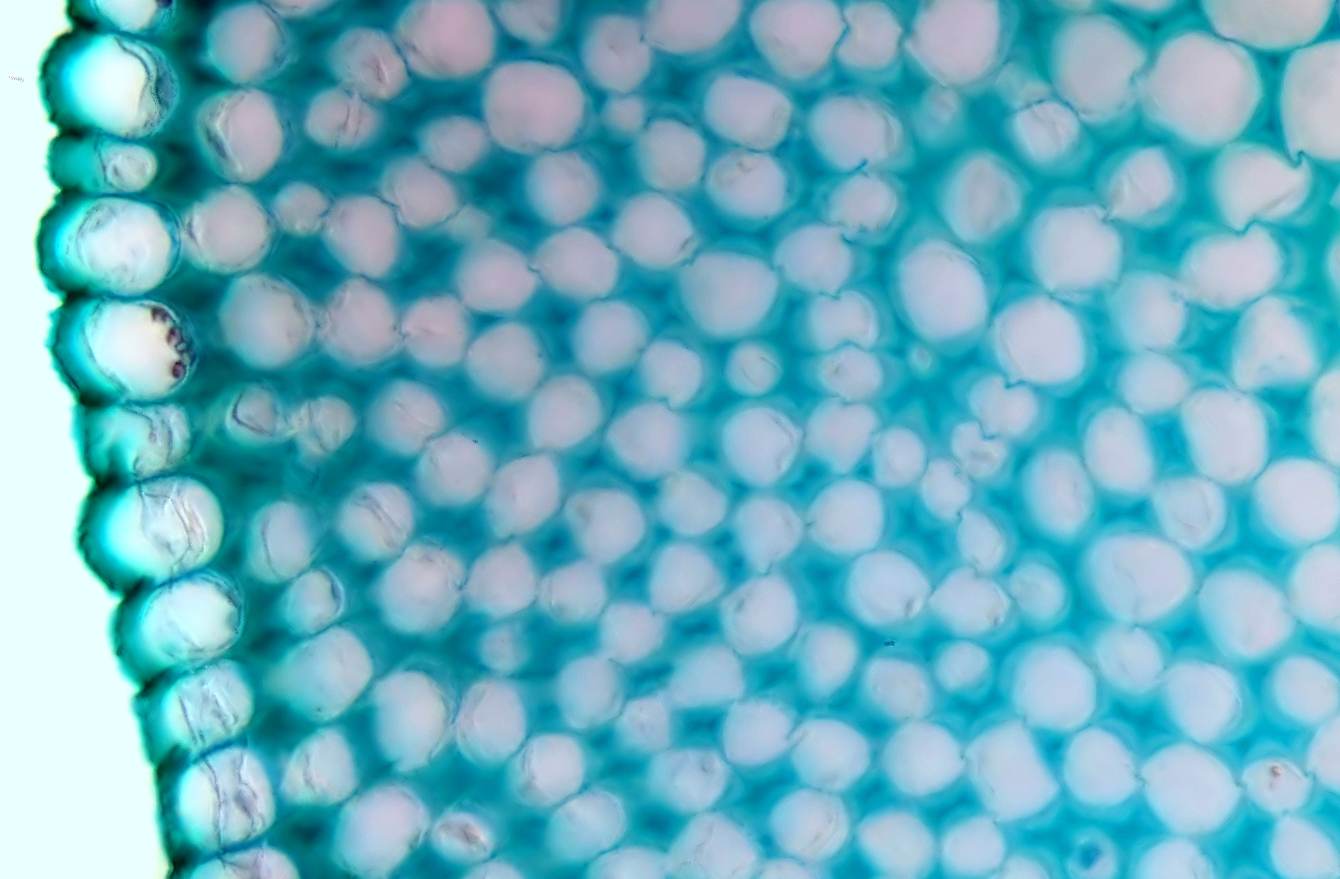 Lamium sp. (deadnettle), leaf, Etzold green.